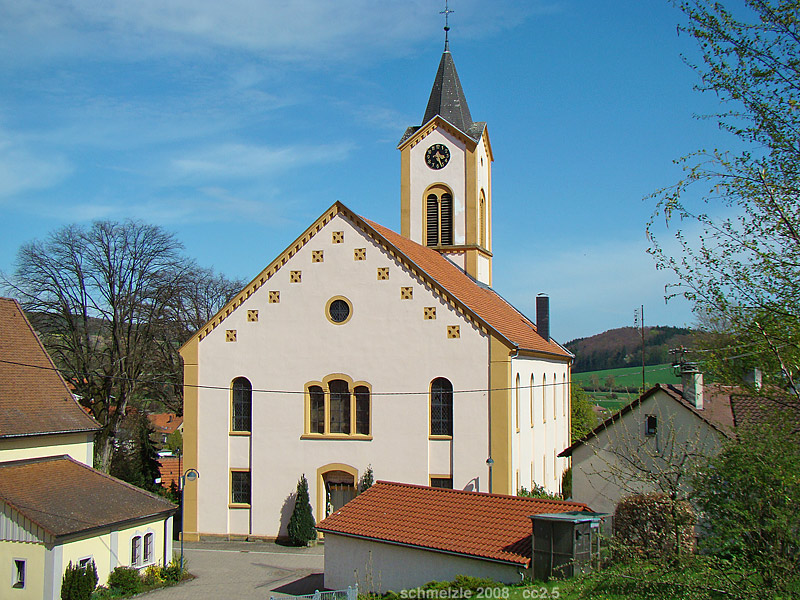 Evang. Kirche in Sinsheim-Reihen